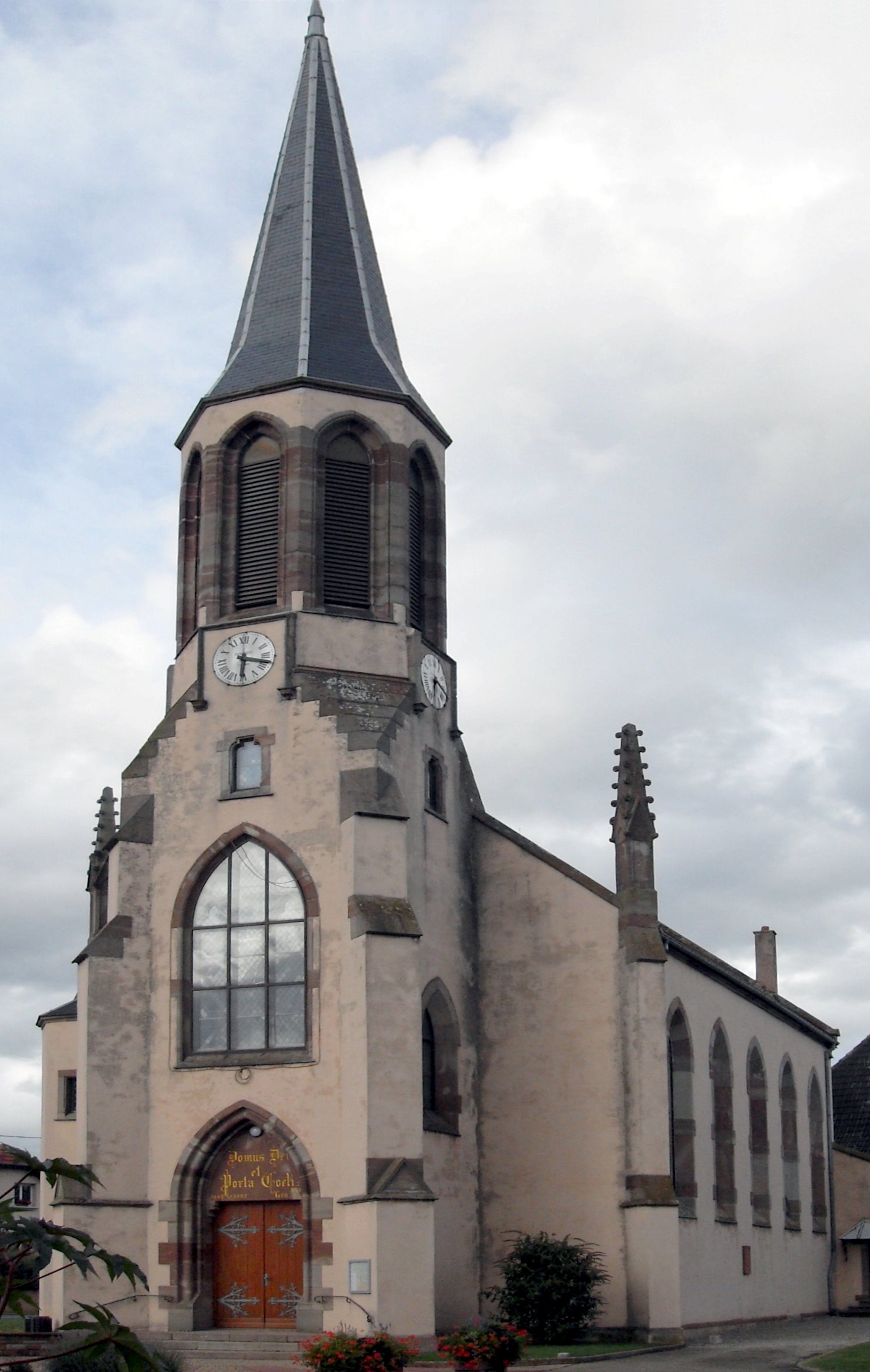 L'église Saints-Projet-et-Amarin à Raedersheim